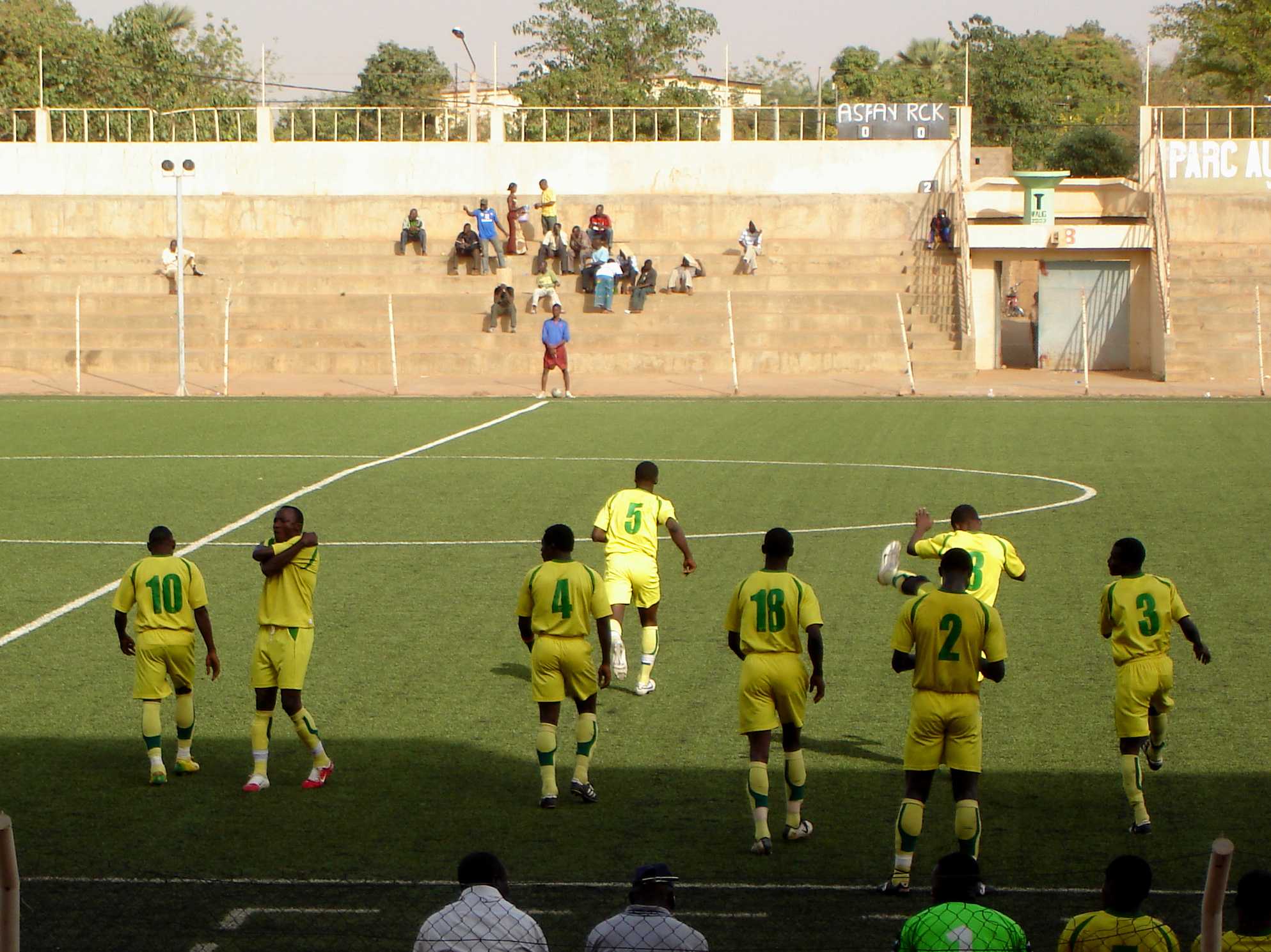 Burkina Faso: Spieler des Erstligisten ASFA-Yennenga Ouagadougou beim Warmlaufen